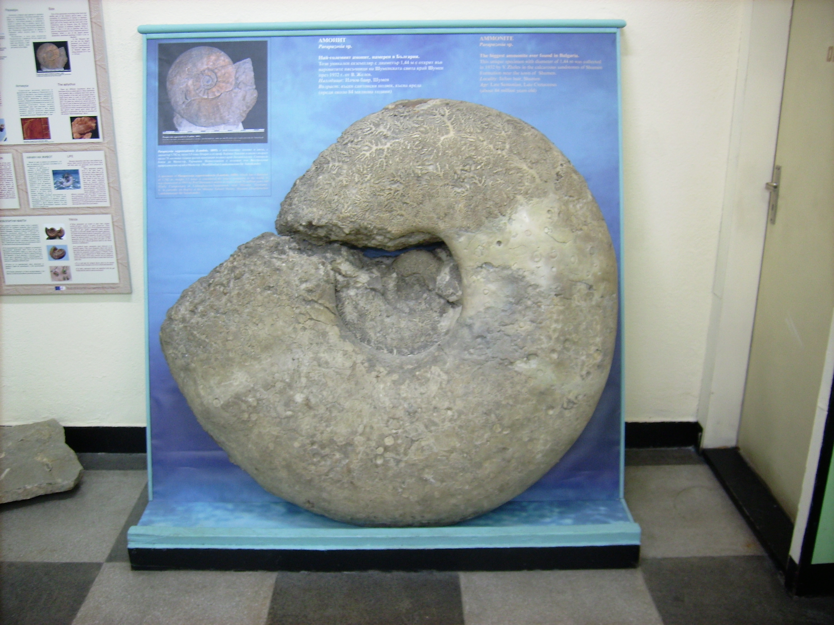 Най-големият амонит открит в България, Национален природонаучен музей, София. Открит е през 1932 година в местността Илчов баир край Шумен. Възрастта му се оценява на около 84 милиона години. Диаметърът му е 1,44 м. Parapuzosia sp. горна креда.